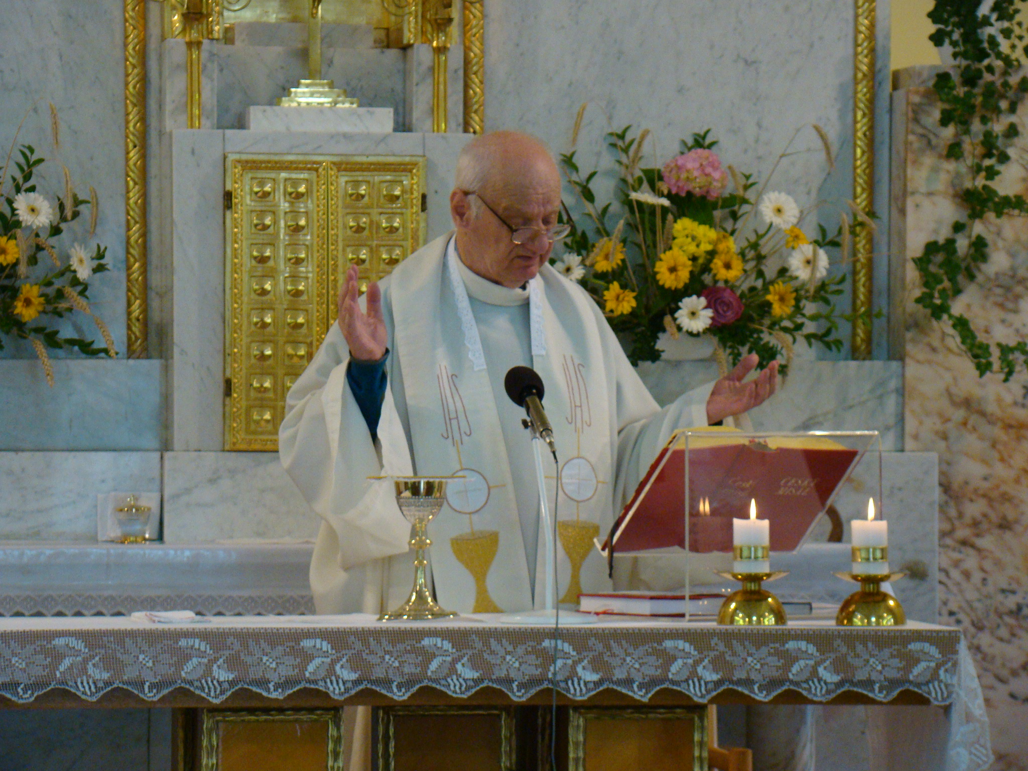 P. Fasora při mši sv. v kapli Domova Sv. Alžběty na Žernůvce (2014)